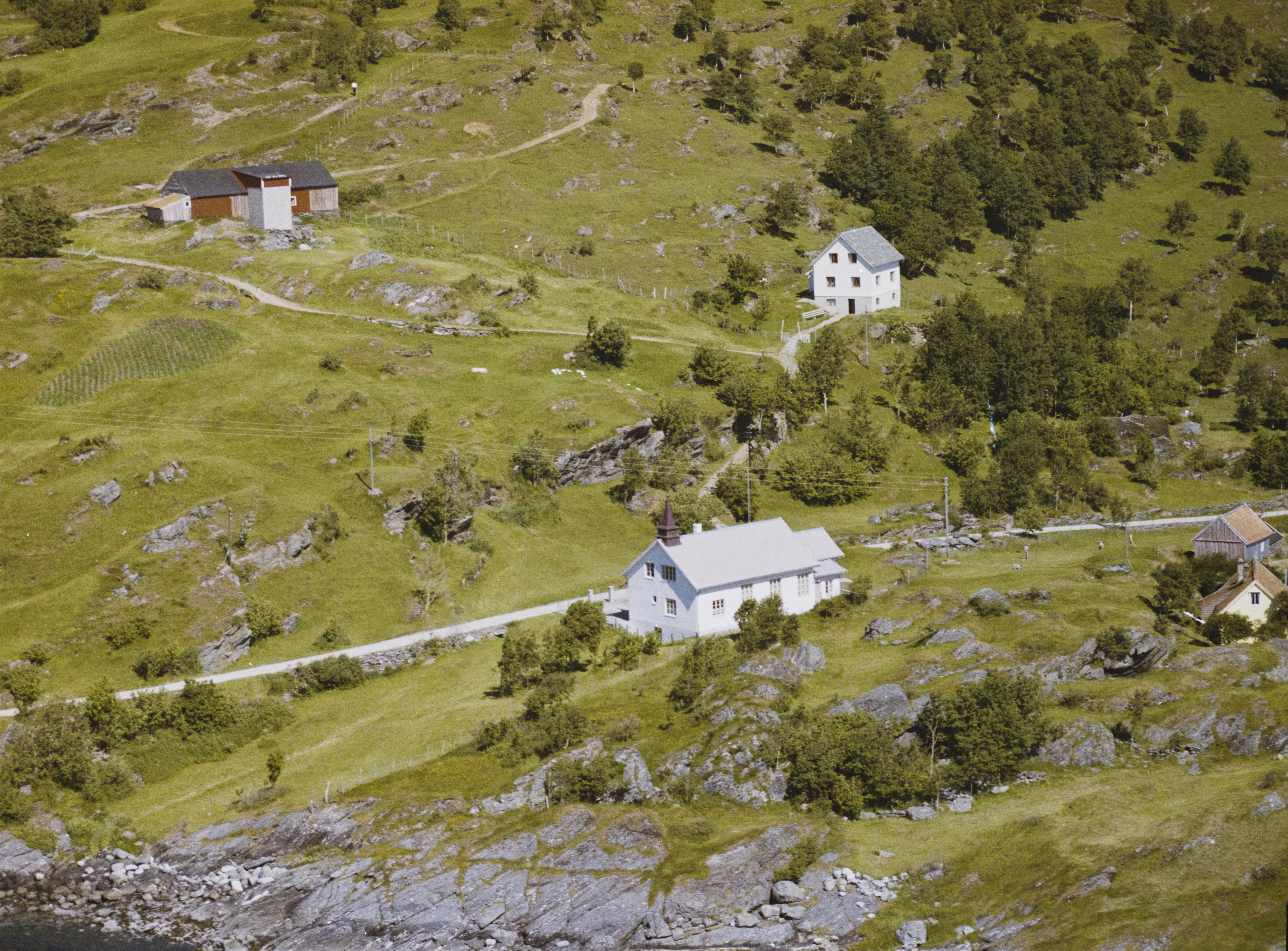 Askrova bedehuskapell. Foto: Widerøes Flyveslskap. Fra Nasjonalbibliotekets samling.